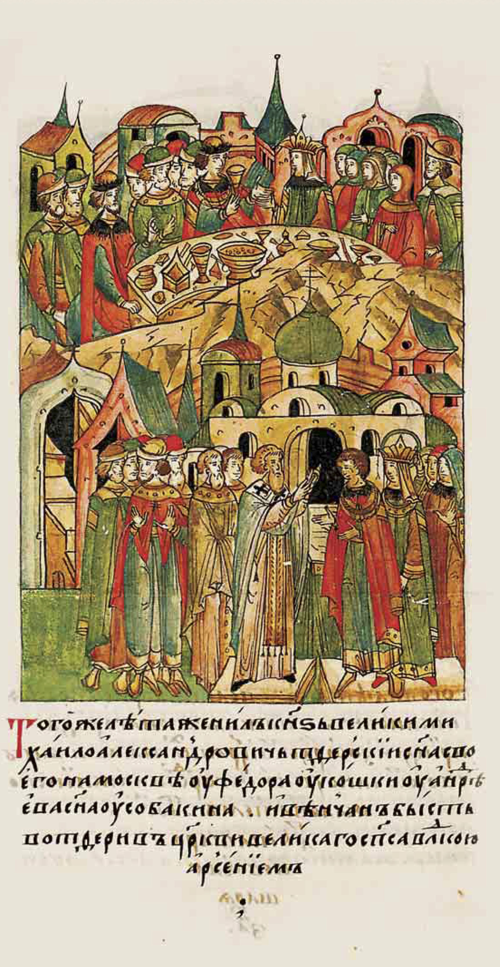 ЛИЦЕВОЙ ЛЕТОПИСНЫЙ СВОД: В том же году женил великий князь Михаил Александрович Тверской сына своего в Москве на дочери Федора Кошки, Андреева сына Собакина, и обвенчан был владыкой Арсением в Твери в церкви великого Спаса.